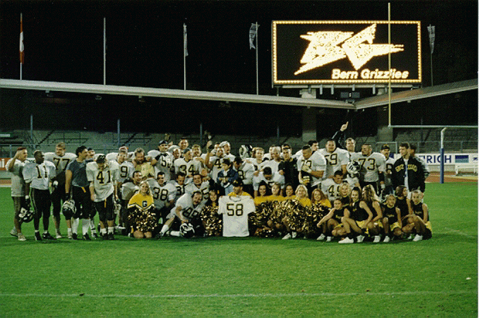 Bern Grizzlies: Meistermannschaft Swissbowl X